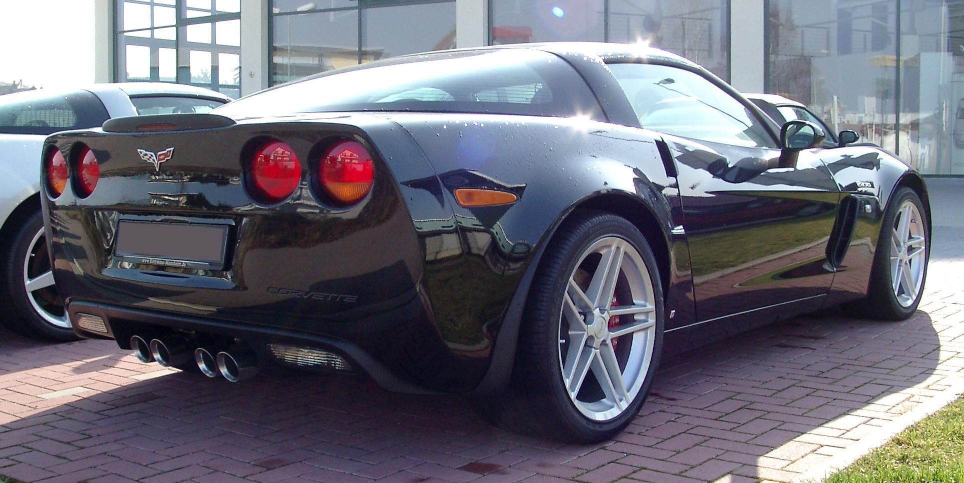 Chevrolet Corvette C6